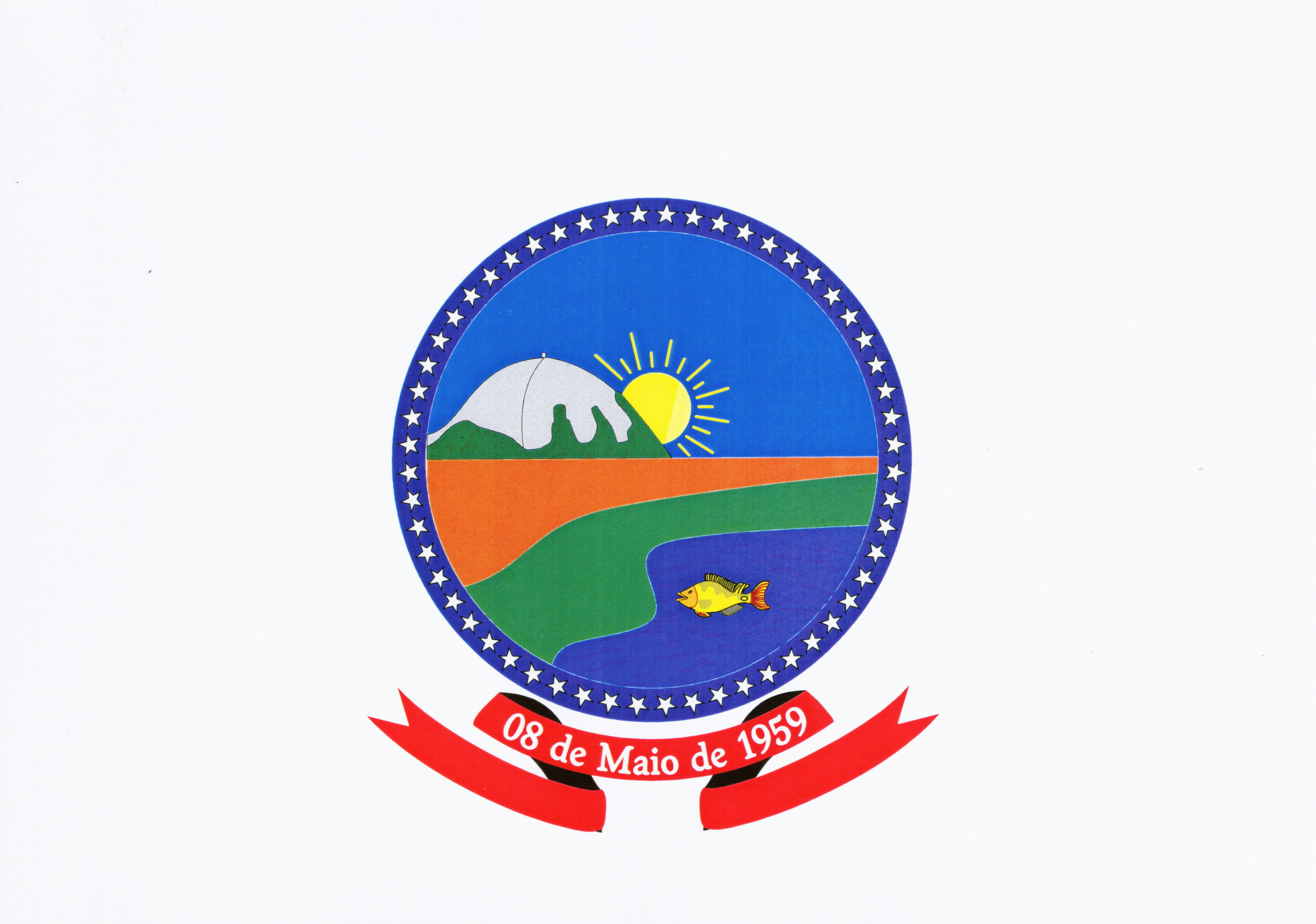 Bandeira do Município de Jericó, Paraíba